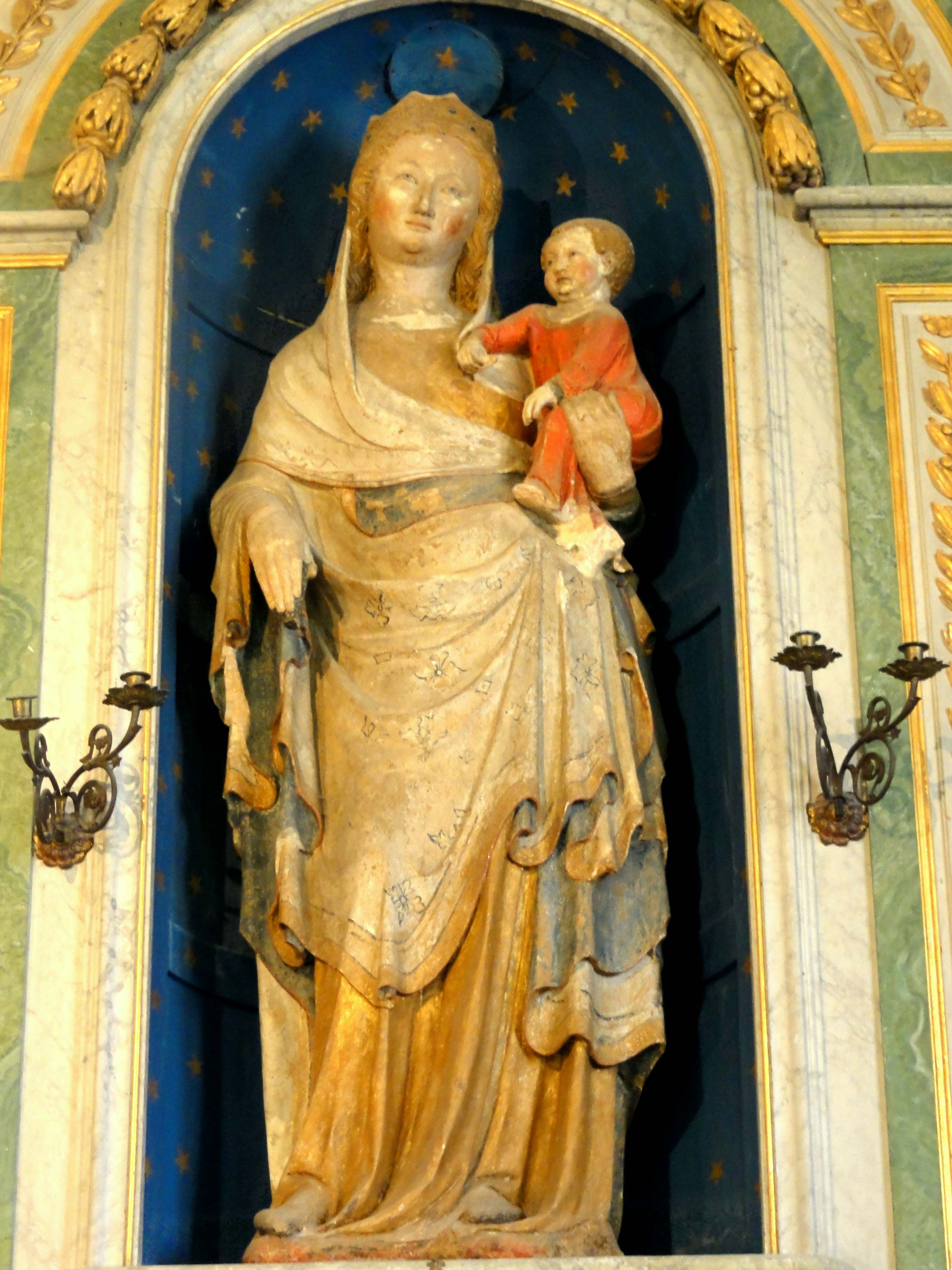 Vierge à l'Enfant.